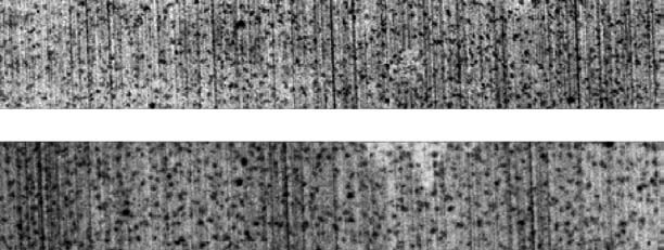 typical back scatter images of surfaces